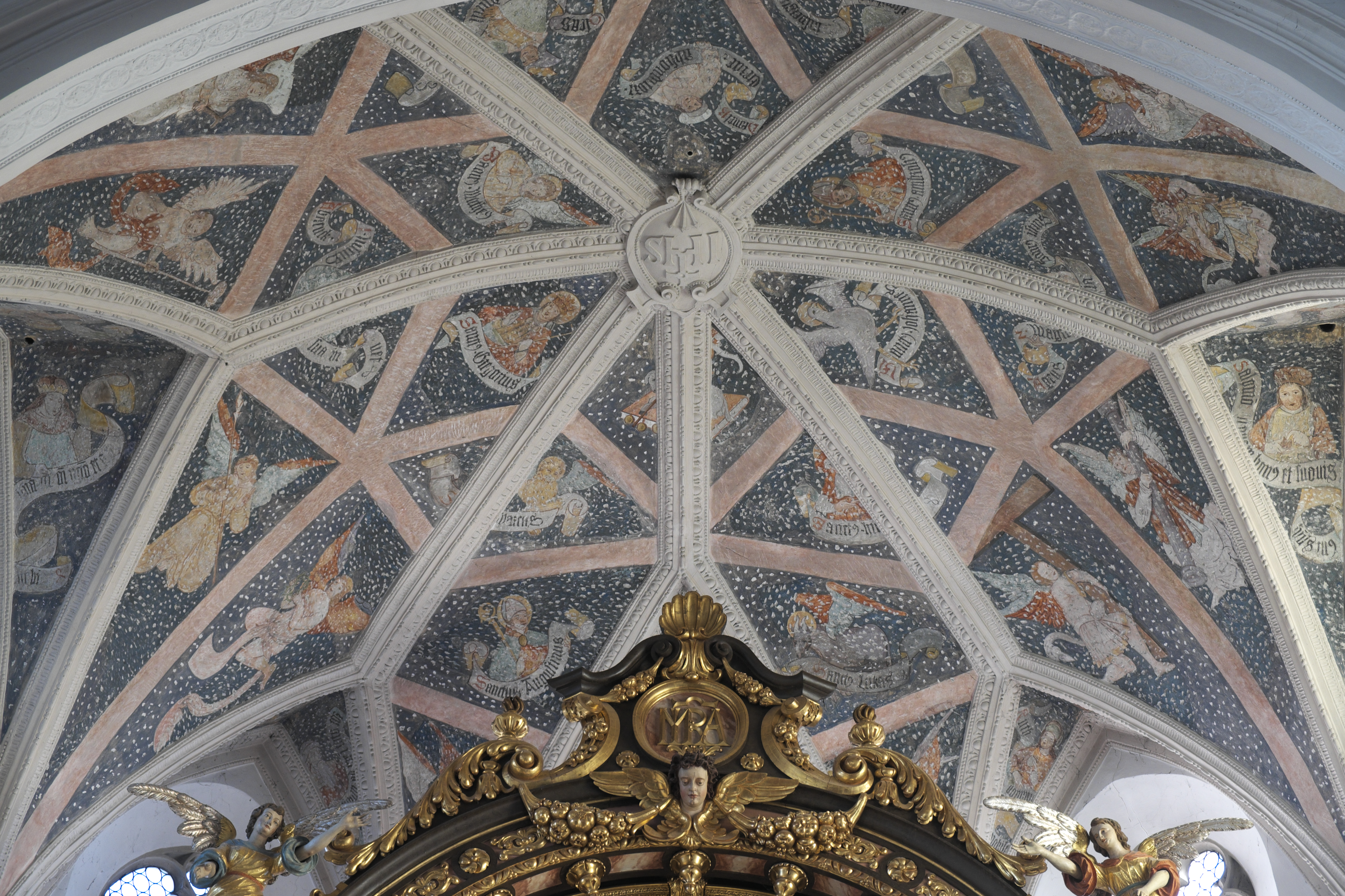 Katholische Pfarrkirche St. Emmeram, ehemalige Benediktinerinnen-Klosterkirche Mariä Himmelfahrt, in Geisenfeld im Landkreis Pfaffenhofen an der Ilm (Bayern/Deutschland), Netzgewölbe mit spätgotischen Fresken von 1516 im Chor; Darstellung: Kirchenväter, Evangelistensymbole, Engel mit Leidenswerkzeugen